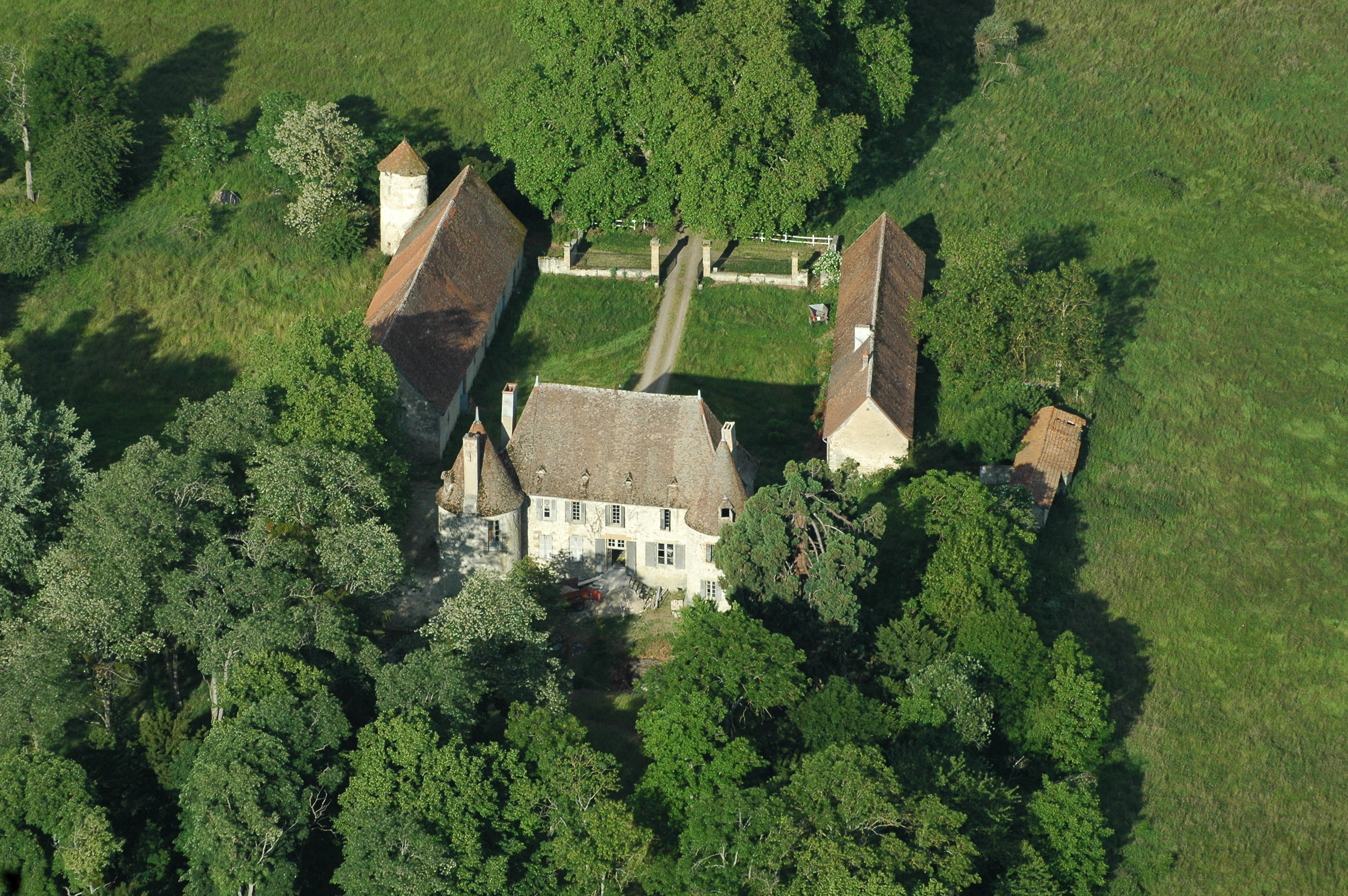 Le château des Ecossais à Bresnay, Allier, France.